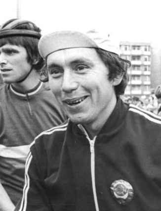 Aleksandr Gusyatnikov